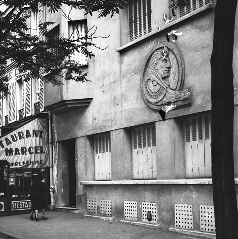 Maison-close Le Sphinx, 31 boulevard Edgar-Quinet à Paris, en 1938.